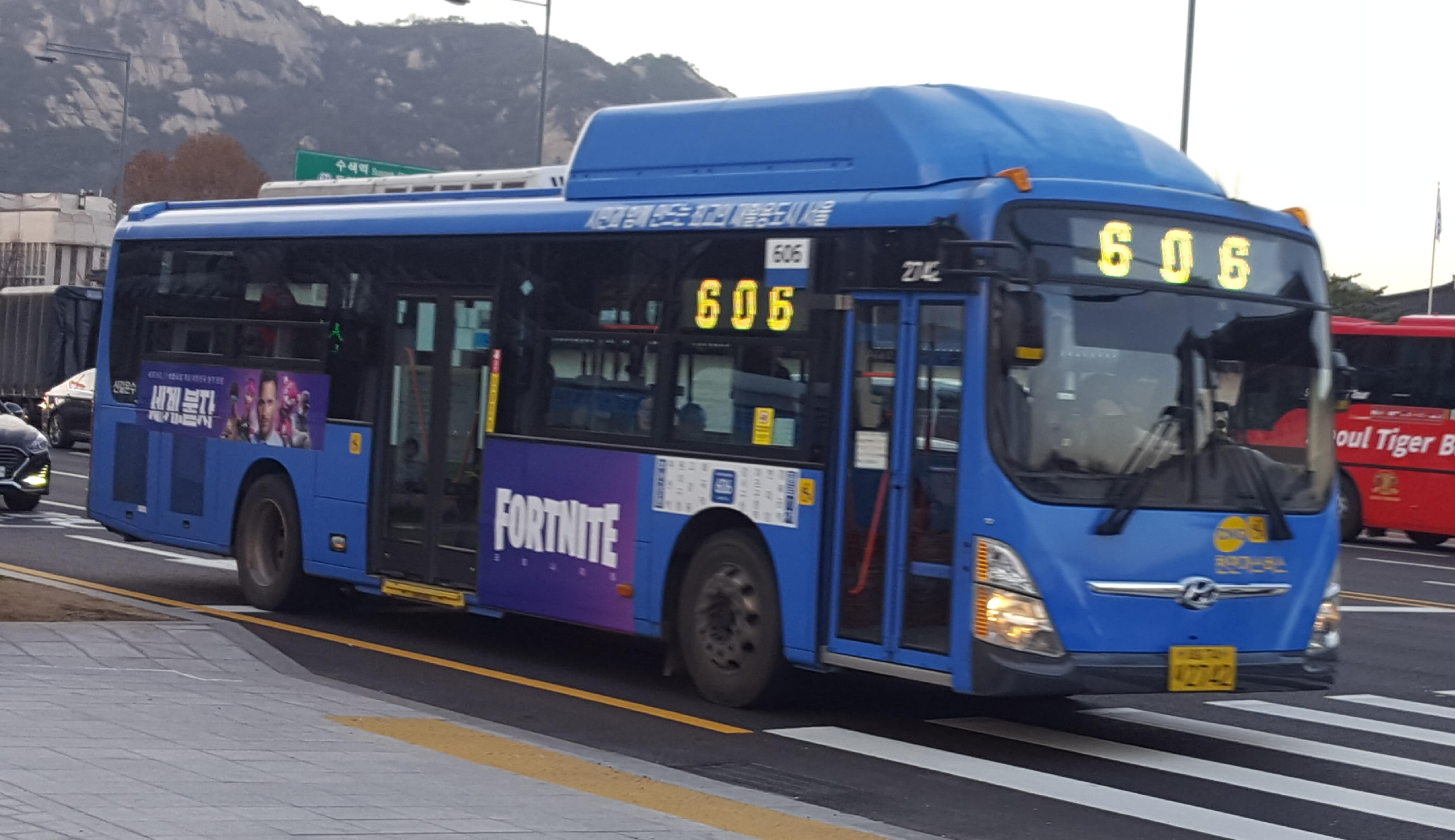 신길운수의 서울 간선버스 606번